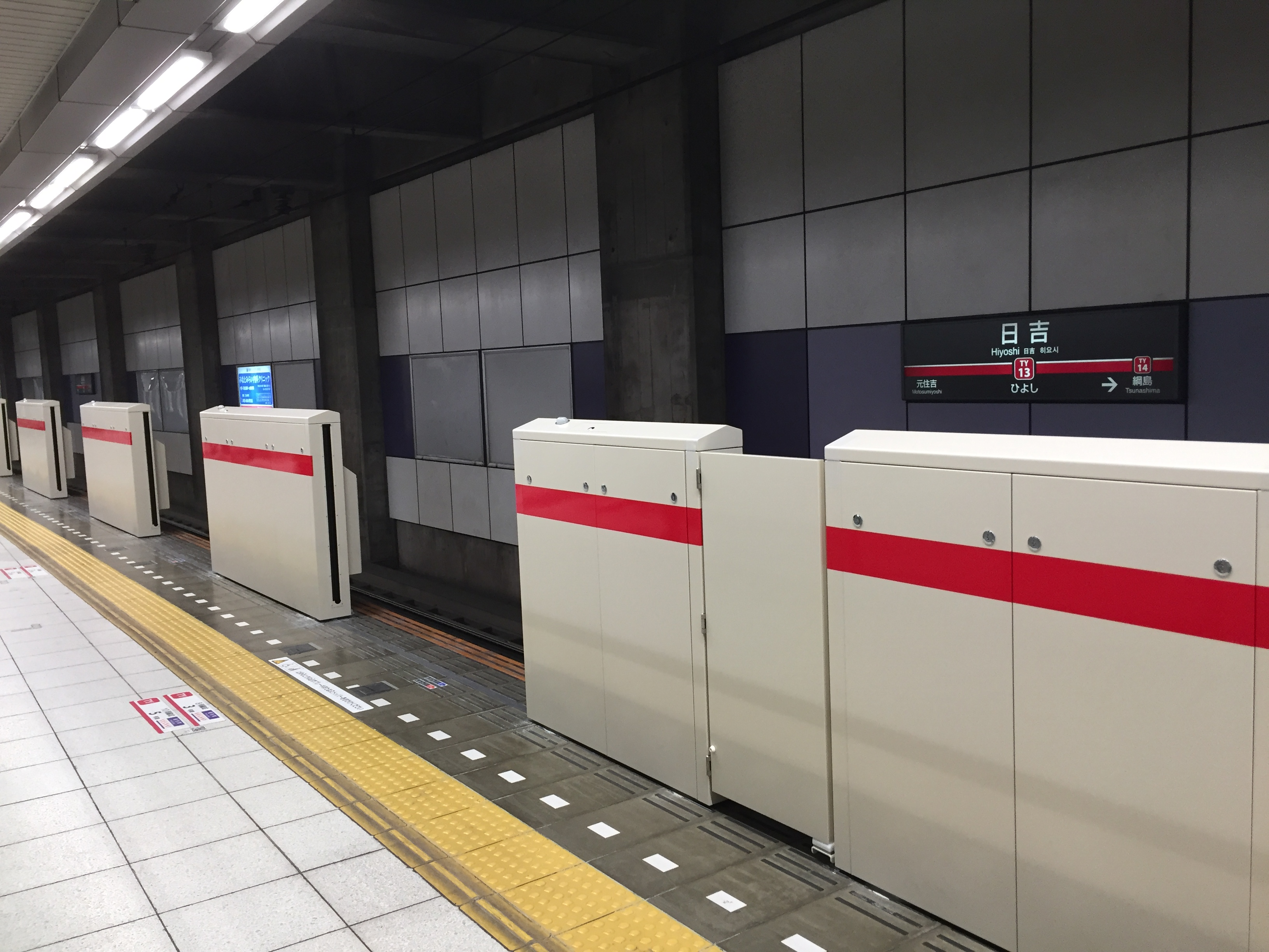 東横線 日吉駅